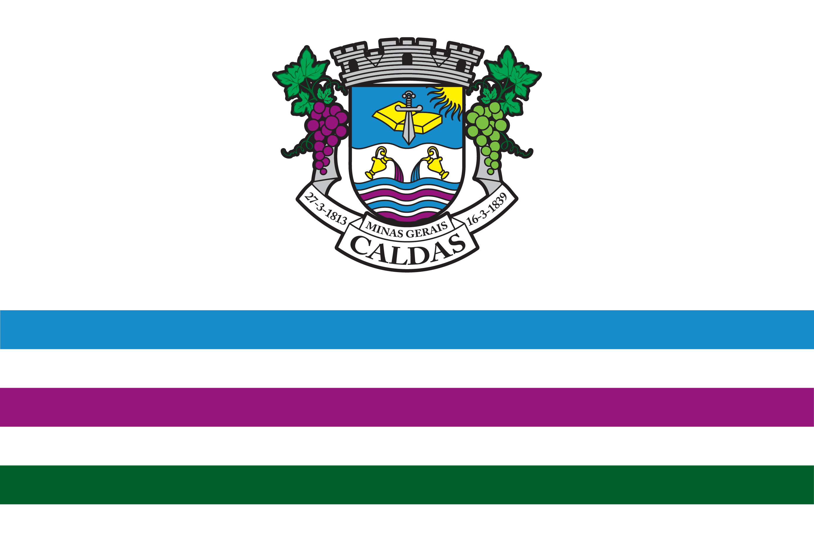 Bandeira do Município de Caldas - MG